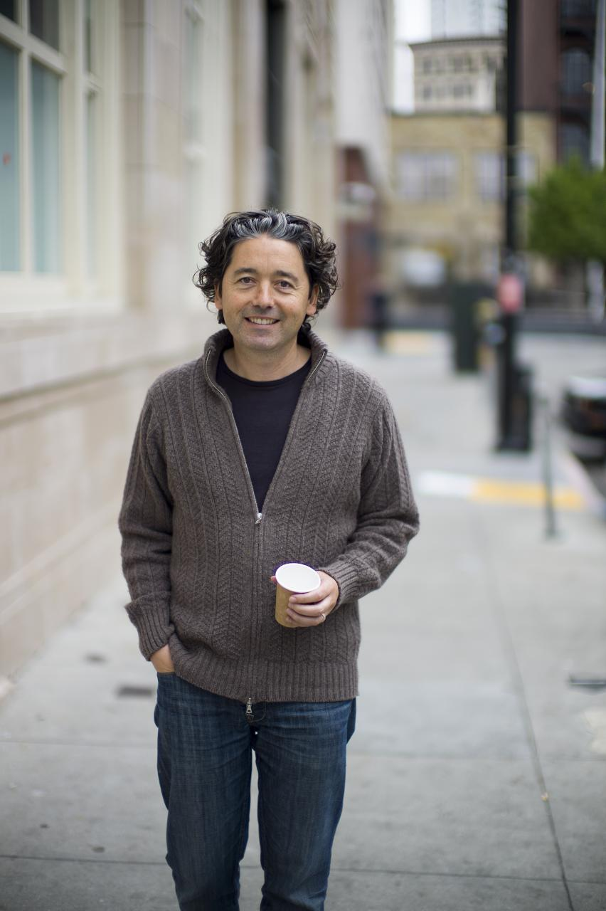 bryan meehan